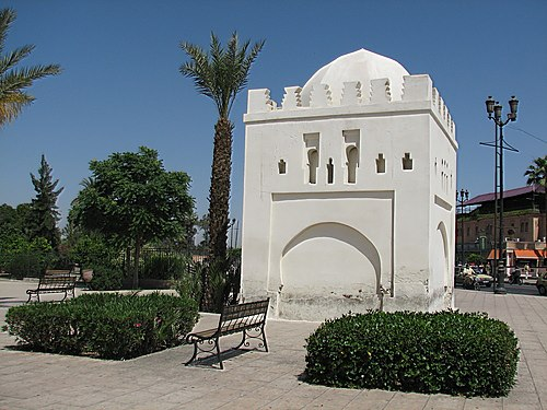 ضريح العذراء الزهراء الكوش قرب جامع الكتبيين وقد تعرض للإغلاق